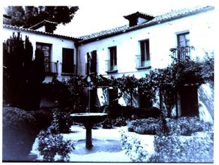 Palacio de Buenavista original.